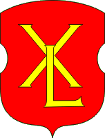 герб Сміли 18 століття